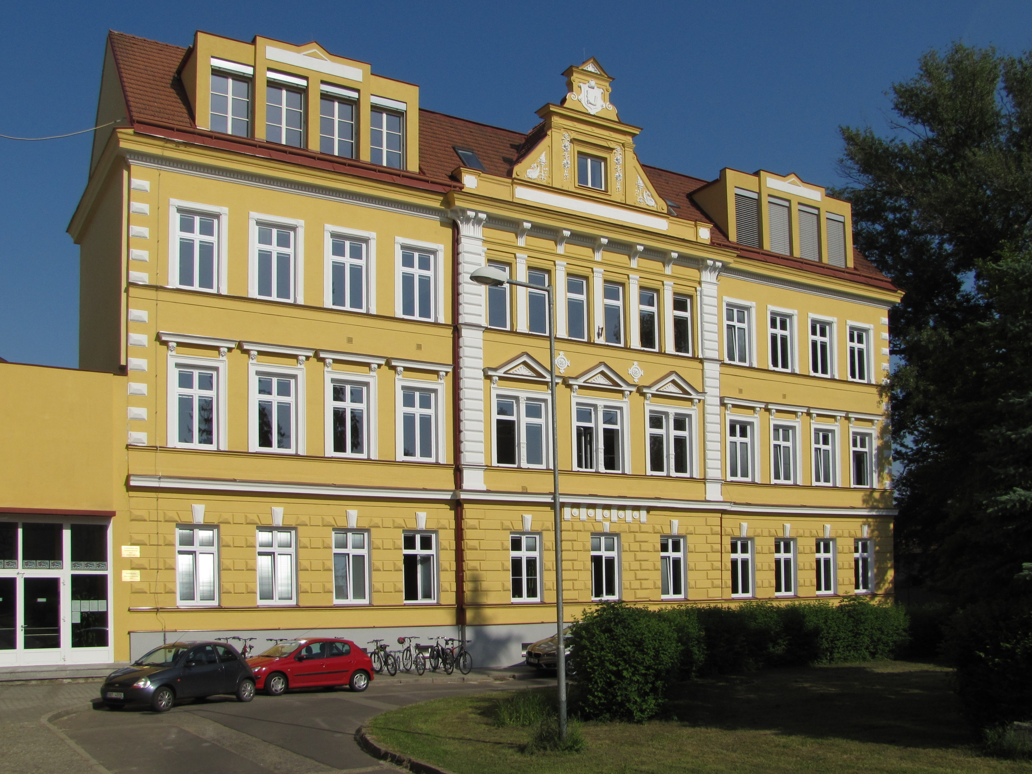 Budova Klvaňova gymnázia v Kyjově, dřívě chlapecká měšťanská škola